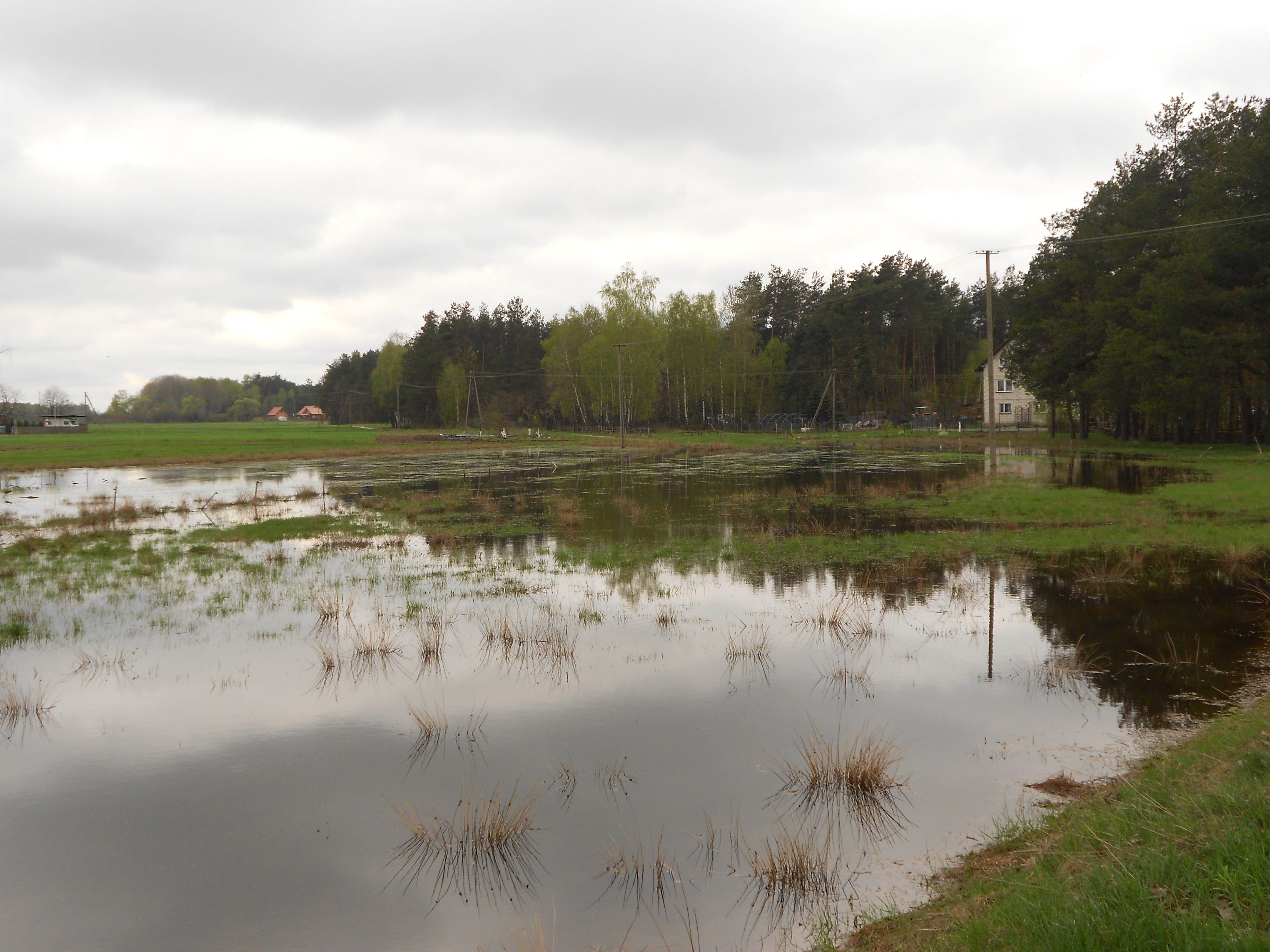 Świdno zalane podczas wiosennych opadów